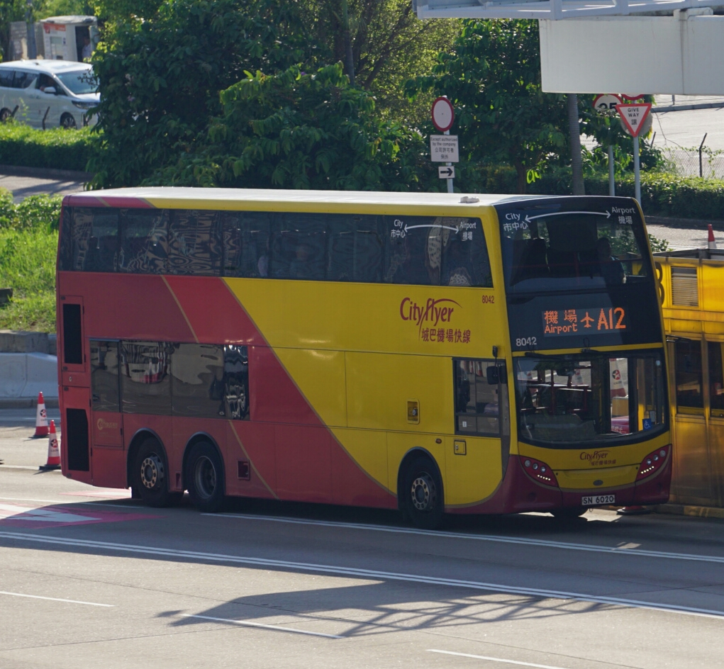 中文（香港）: 城巴A12線，剛駛出西區海底隧道